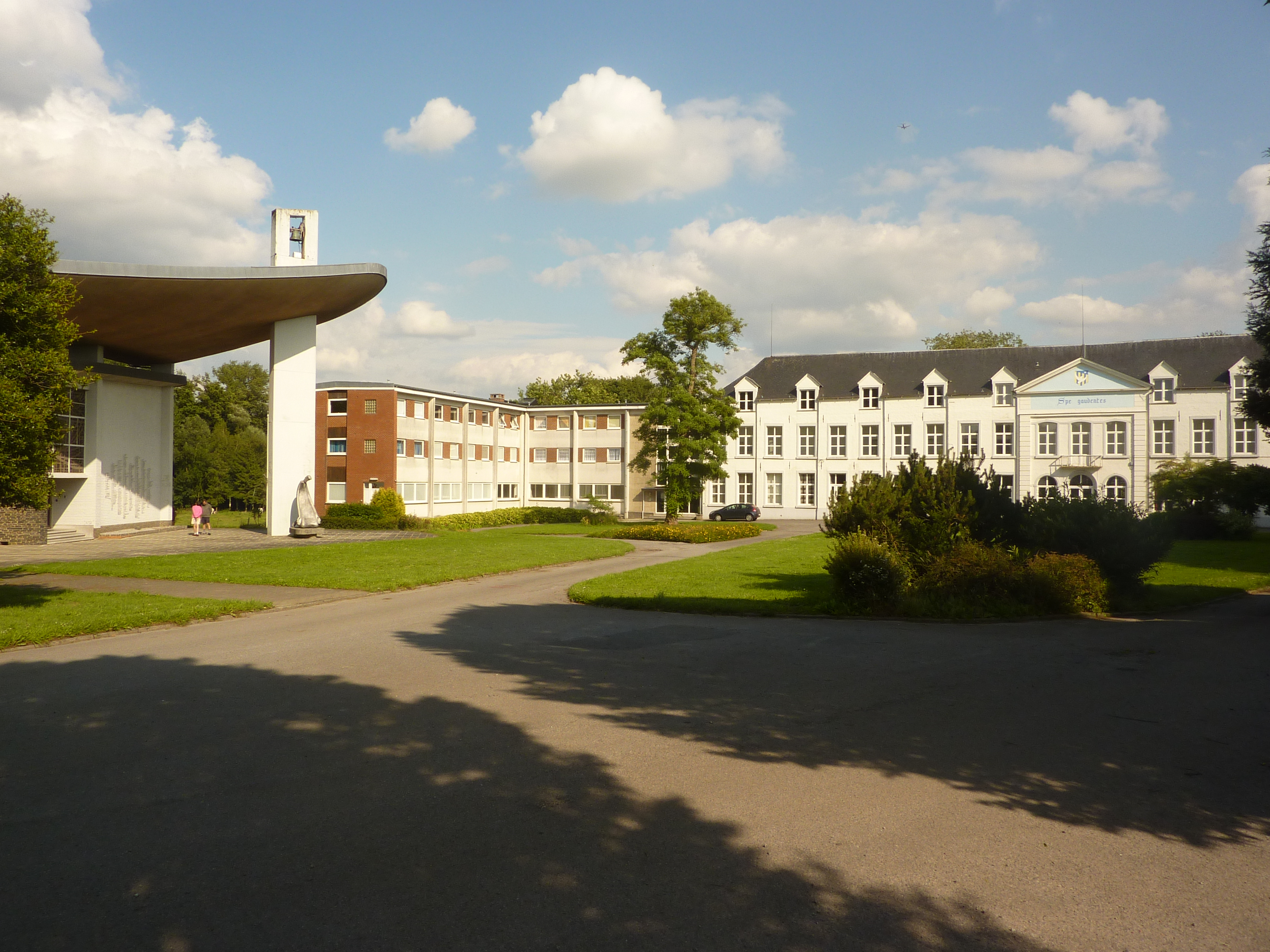 Chapelle-Mémorial Kongolo de Gentinnes, Belgique.